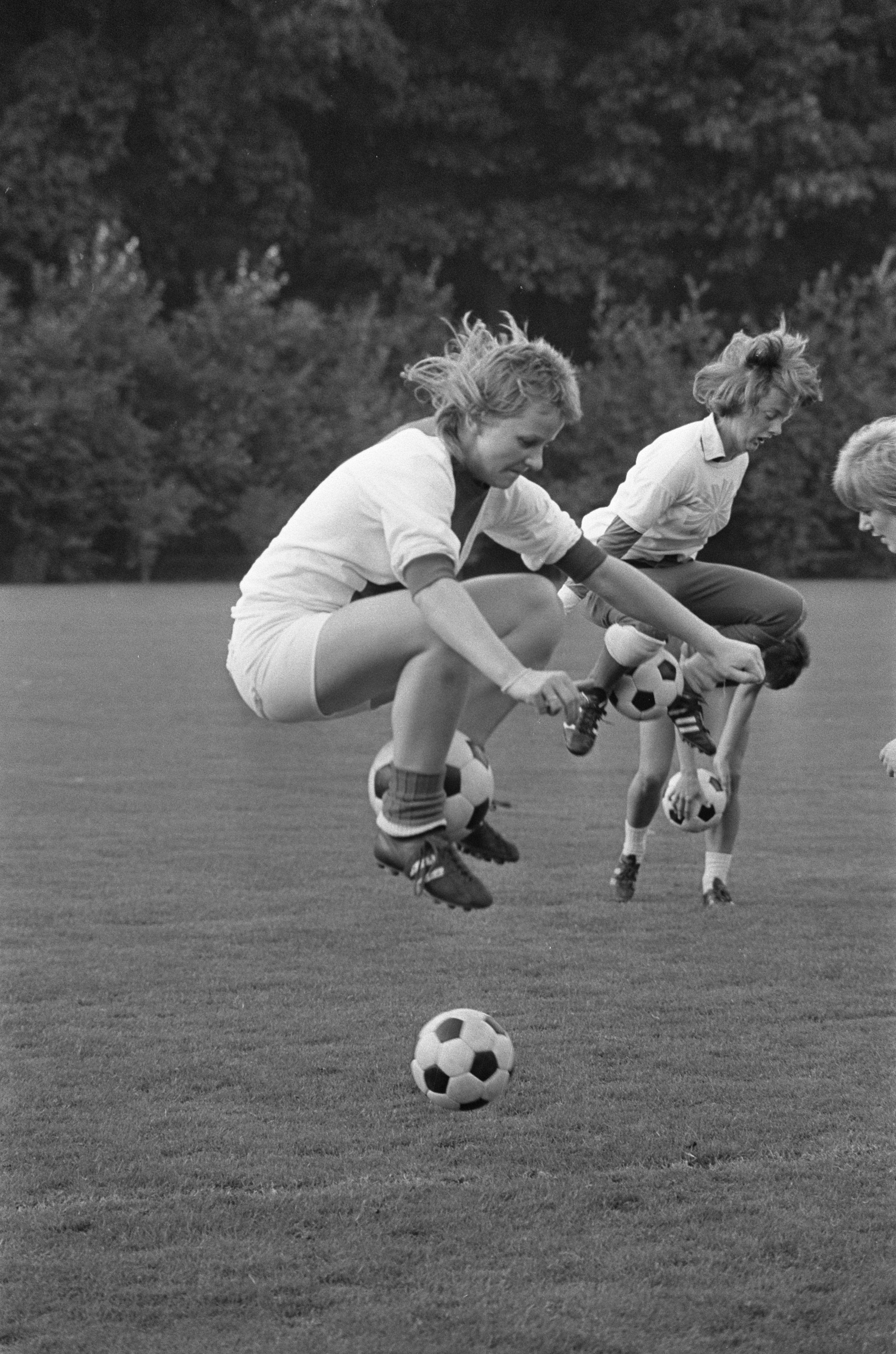 Collectie / Archief : Fotocollectie Anefo Reportage / Serie : [ onbekend ] Beschrijving : Training nationaal dames-voetbalelftal in Zeist, Jose van Hoof (voorgrond) tijdens training Datum : 26 september 1973 Locatie : Utrecht, Zeist Trefwoorden : sport, voetbal Fotograaf : Peters, Hans / Anefo Auteursrechthebbende : Nationaal Archief Materiaalsoort : Negatief (zwart/wit) Nummer archiefinventaris : bekijk toegang 2.24.01.05 Bestanddeelnummer : 926-7068